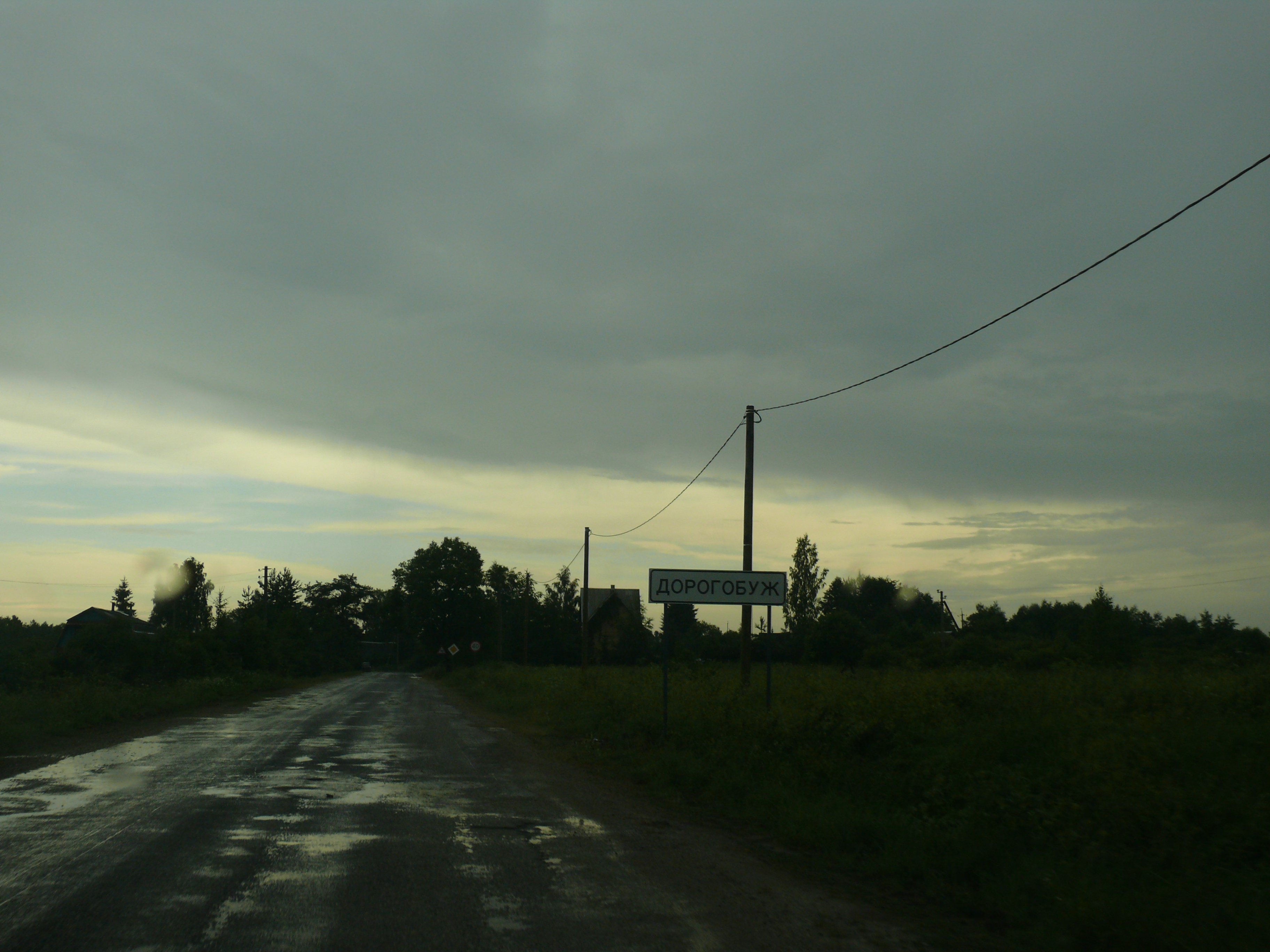 Деревня Дорогобуж, Новгородский район Новгородской области